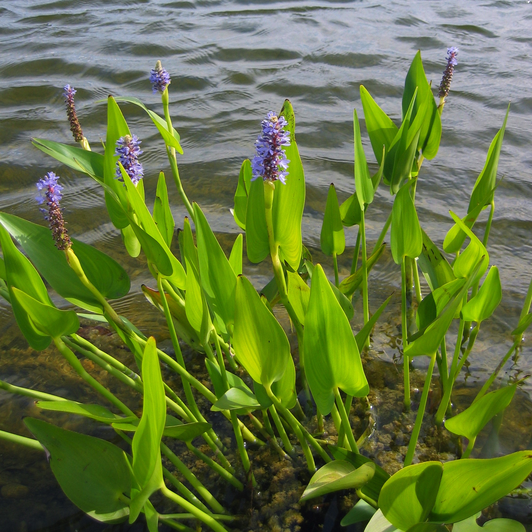 Pontederia cordata am Ufer eines Zierteiches in Deutschland